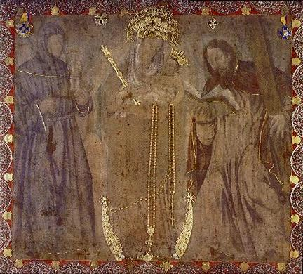 Cuadro de la Virgen de Chiqunquirá, venerada en Colombia en medio de San Antonio de Padua y San Andrés.